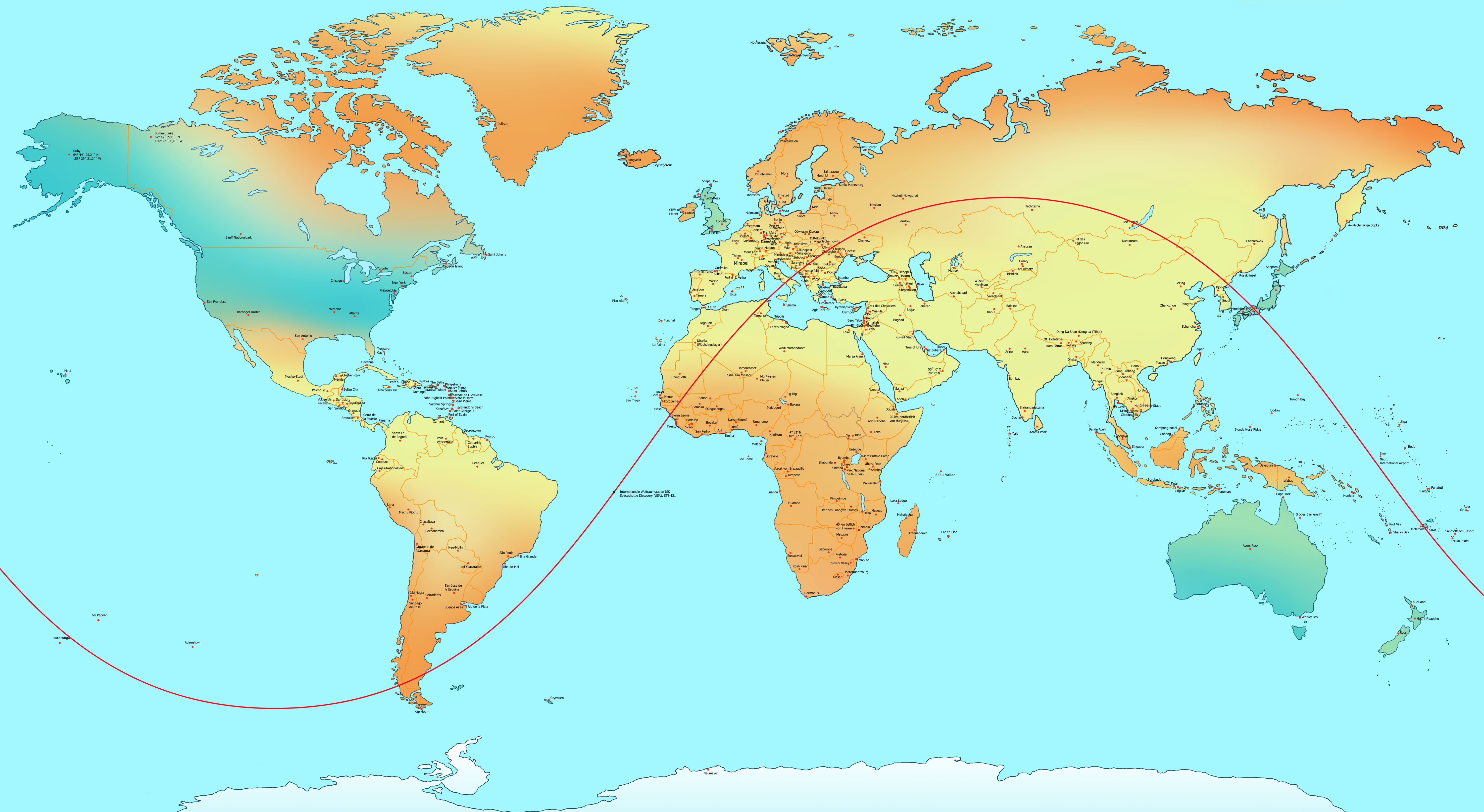 Welt Auge - Der Weg der Steine, Weltkarte mit allen Ablagepunkten